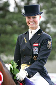 Victoria Max-Theurer Achleiten 2005 Dressur